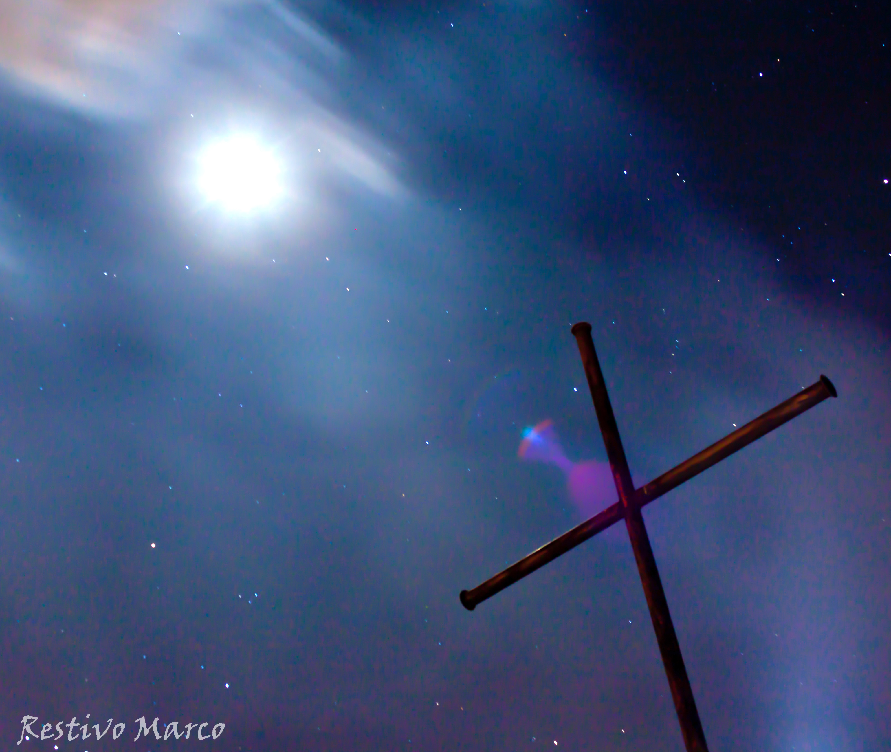 Croce sulla cima di Monte Zoccolaro in una notte di luna piena